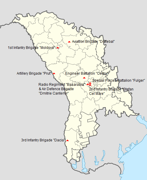 Расположение военных баз Армии РМ